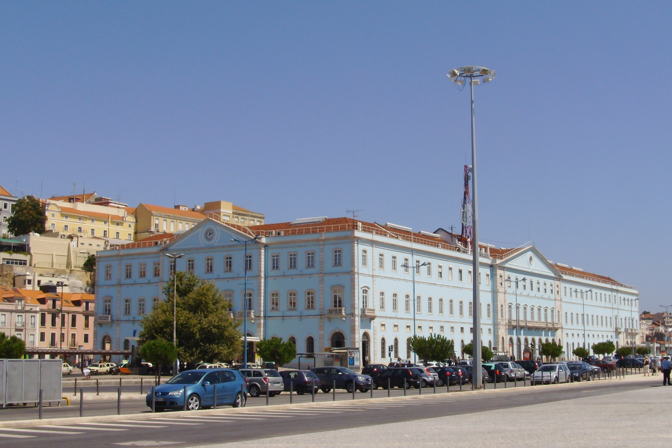 Estação Ferroviária de Lisboa-Santa Apolónia: vista exterior pelo lado do rio Tejo.